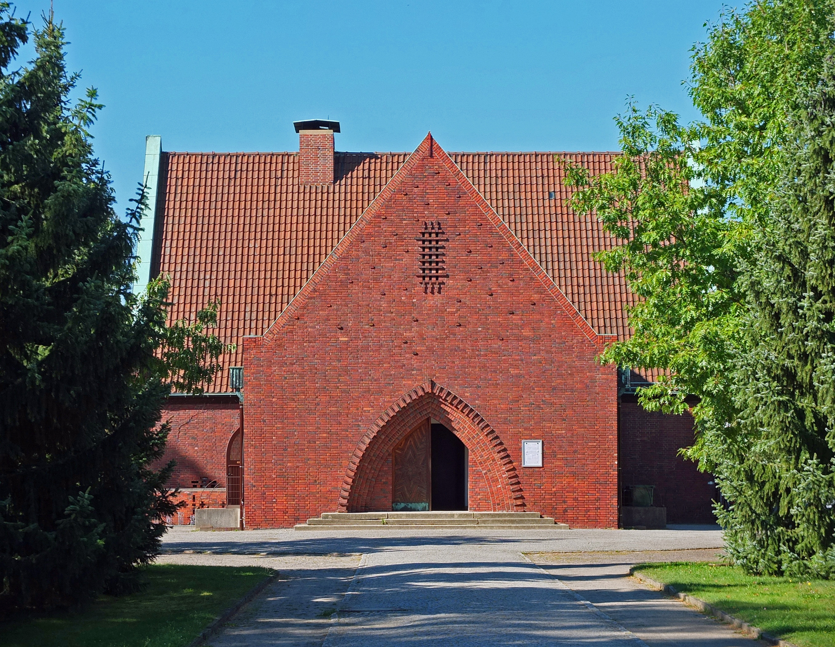 Expressionistische Friedhofskapelle nach Entwürfen von Erich Schwiertz 1930/31 auf dem Friedhof Zehlendorf erbaut.This is a photograph of an architectural monument.